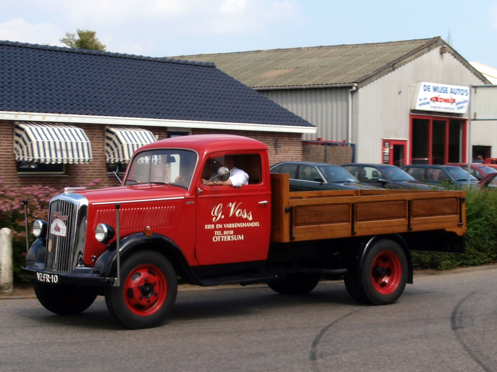 1949 Opel 1.5T - 45